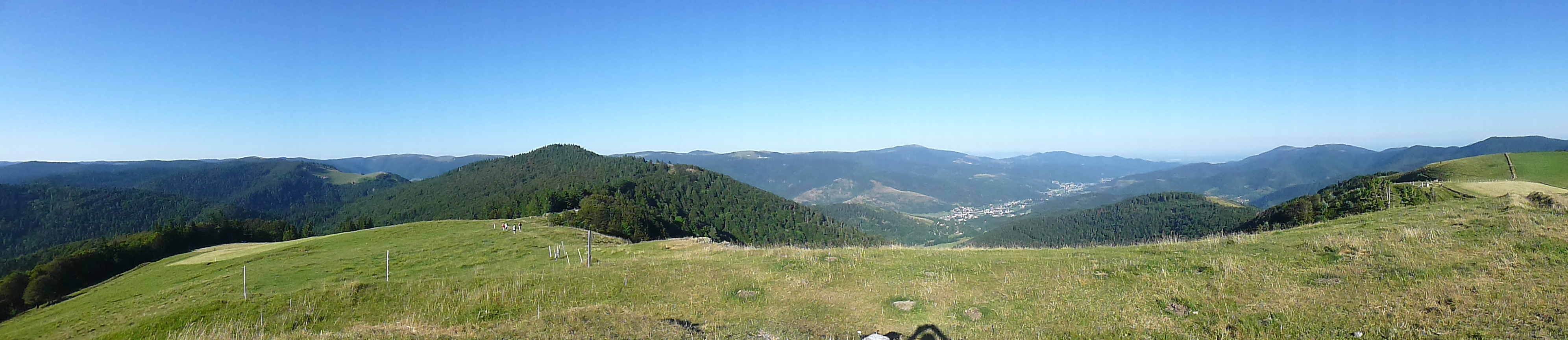 Vue panoramique depuis le sommet du Drumont (Vosges) vers l'est : sont visibles le Ballon de Guebviller, la vallée de la Thur, la plaine d'Alsace et la Forêt-Noire. Les Alpes bernoises sont visibles par temps clair.